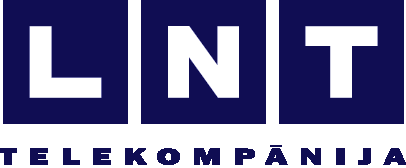 Логотип канала LNT